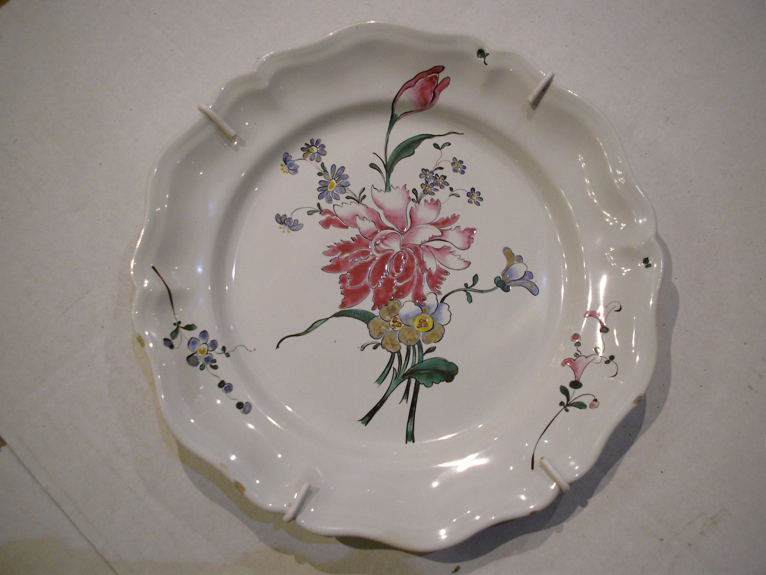 assiette en faïence de Strasbourg, Joseph hannong 1762-1775, collection privée, Musée du pain d'épice de Gertwiller